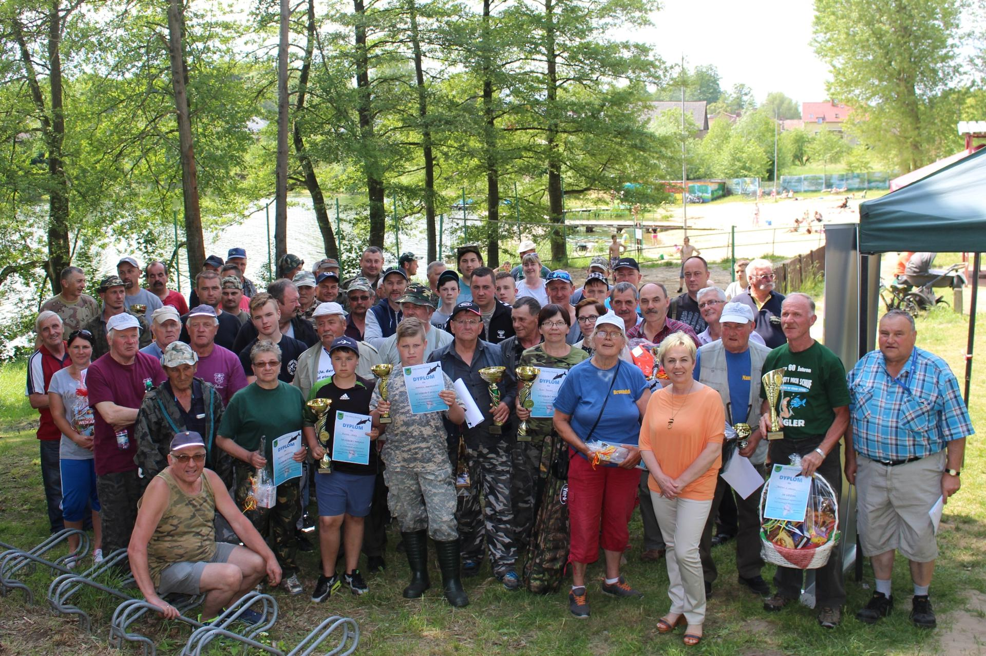 Uczestnicy zawodów wędkarskich w Kłodawie